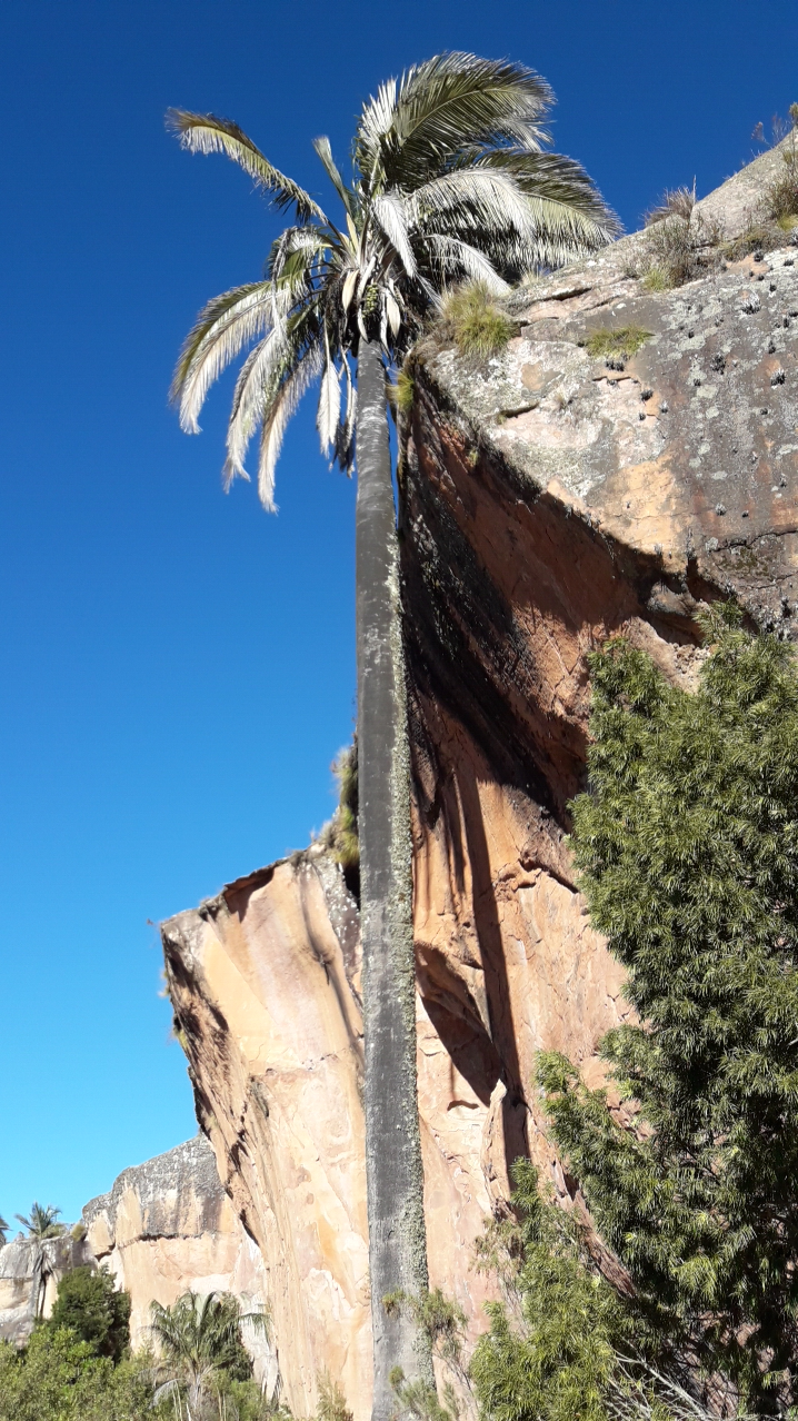 El janchicoco (Parajubaea torallyi) es una palmera de endémica de Bolivia protegida en el Área natural de manejo integrado El Palmar.